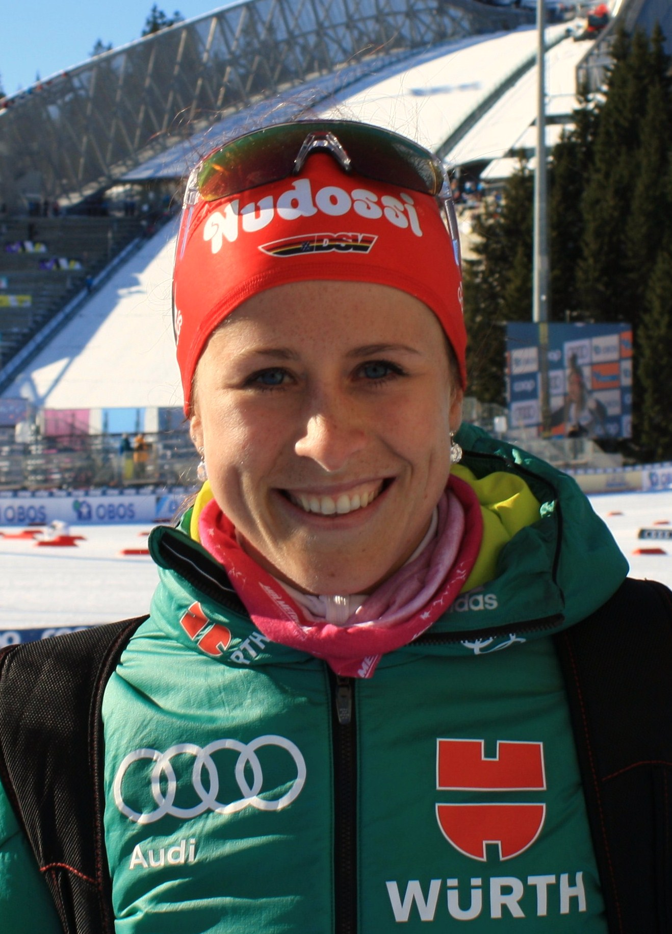 Katharina Hennig am Holmenkollen in Oslo, 10.03.2019